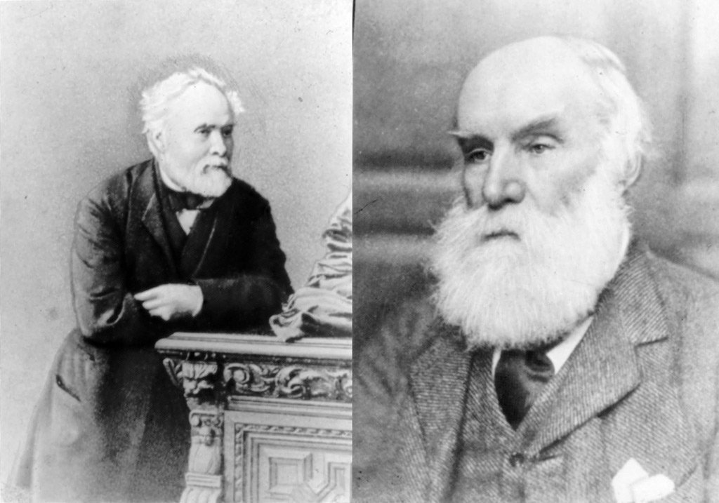 Портреты. Мюр Эндрю и Арчибалд Мерилиз. ~1890-е гг, Россия.